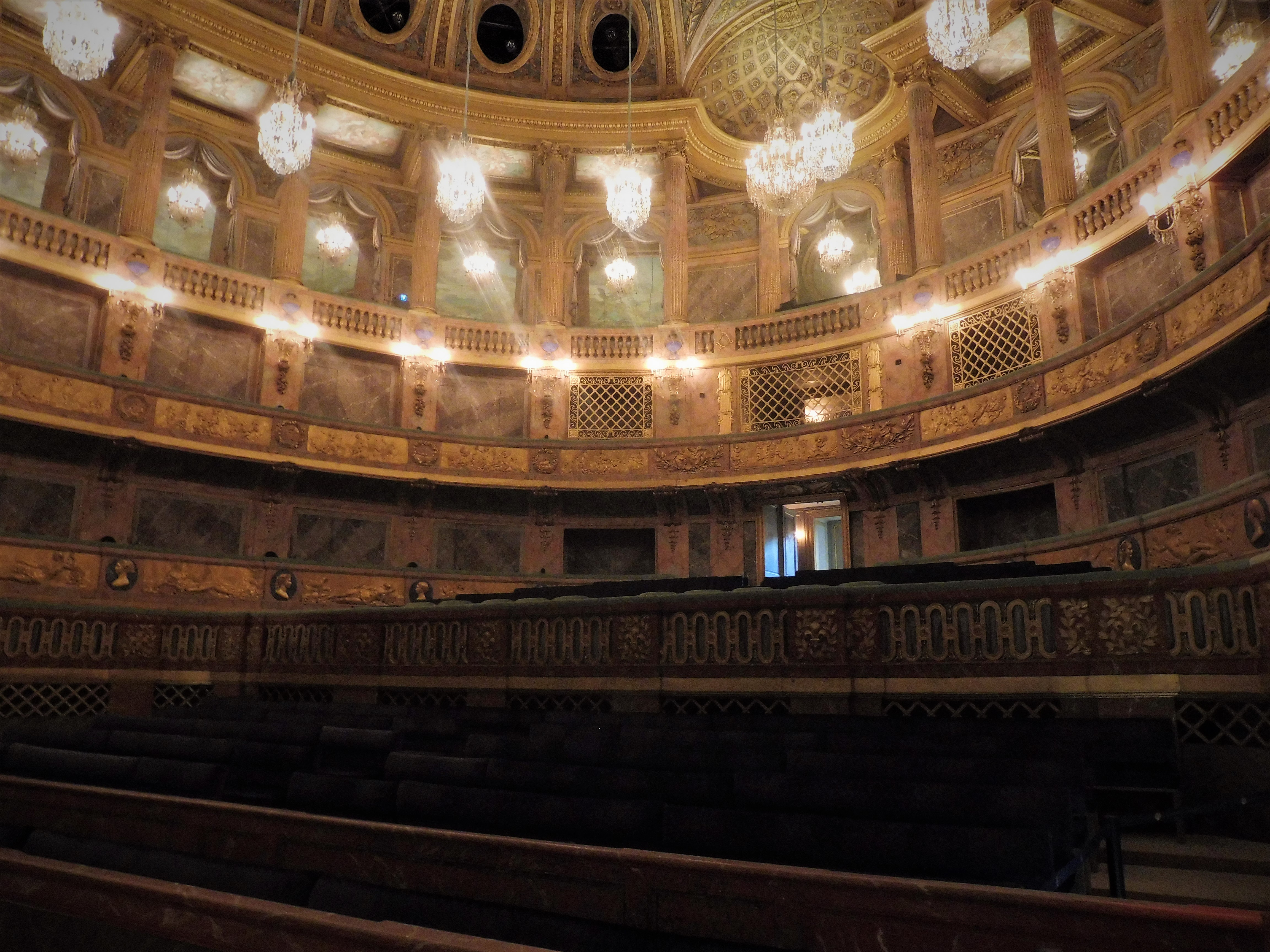 Vue générale de l'opéra royal du château de Versailles.